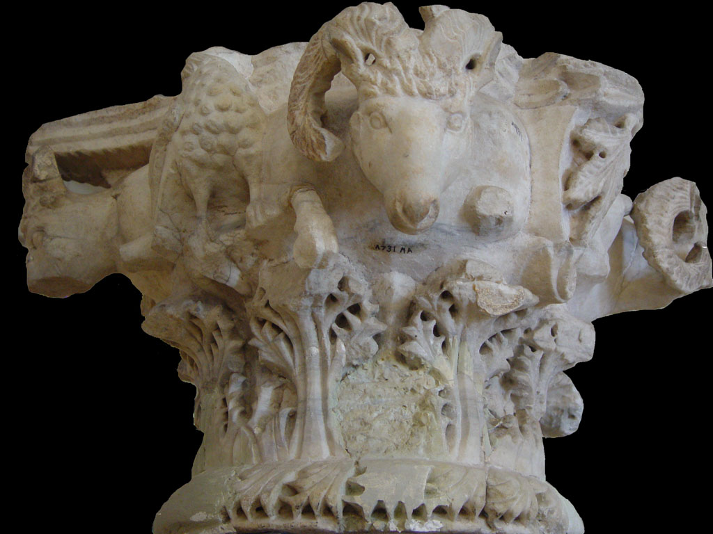 Capitel paleocristiano con prótomes de carnero de Anfípolis Chapiteau à protomes de bélier provenant d'une basilique paléochrétienne d'Amphipolis. Photographie prise le 16/06/2002 par Marsyas.